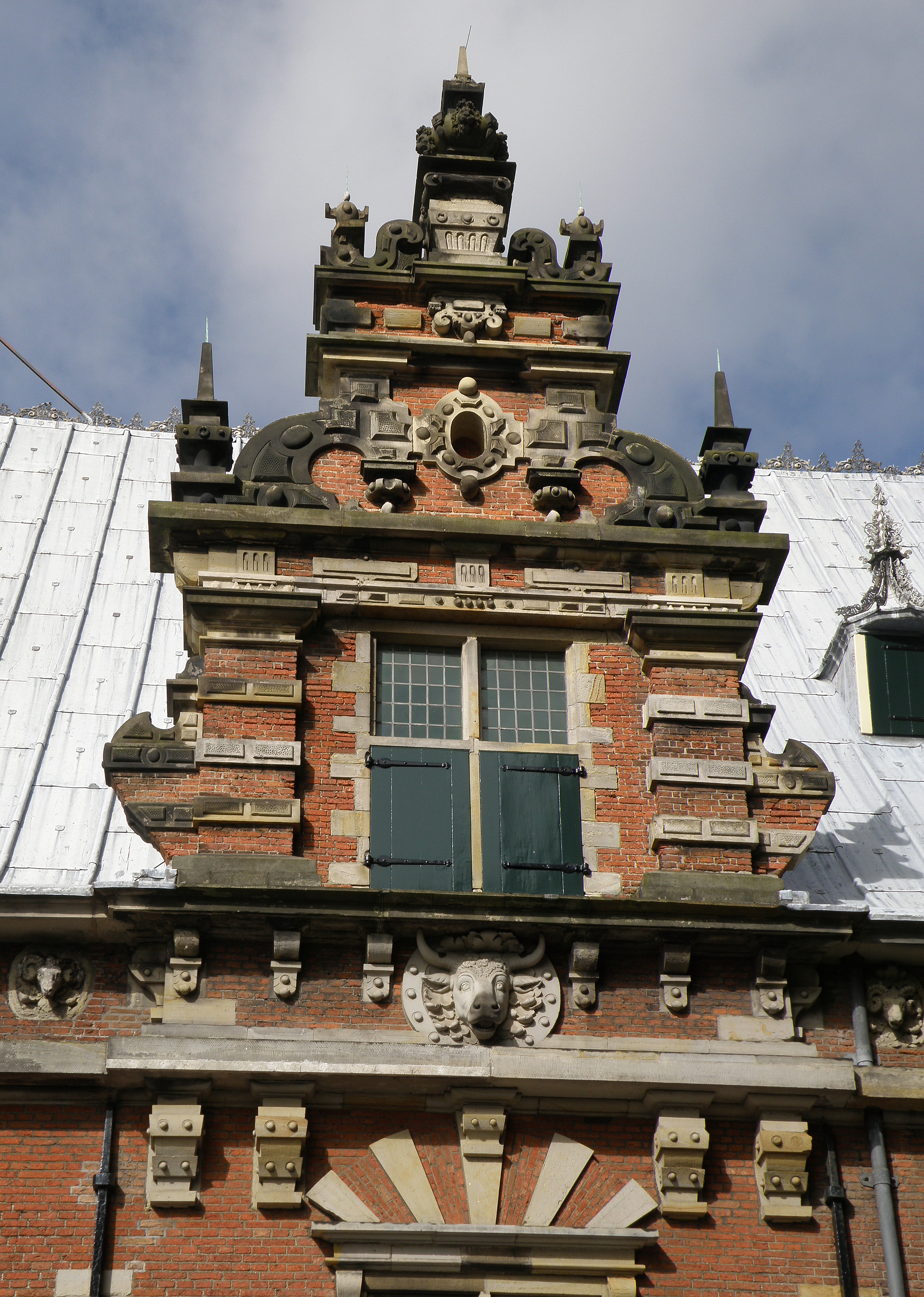 Haarlem, Nederland. Vleeshal, geveltop in zijgevel.